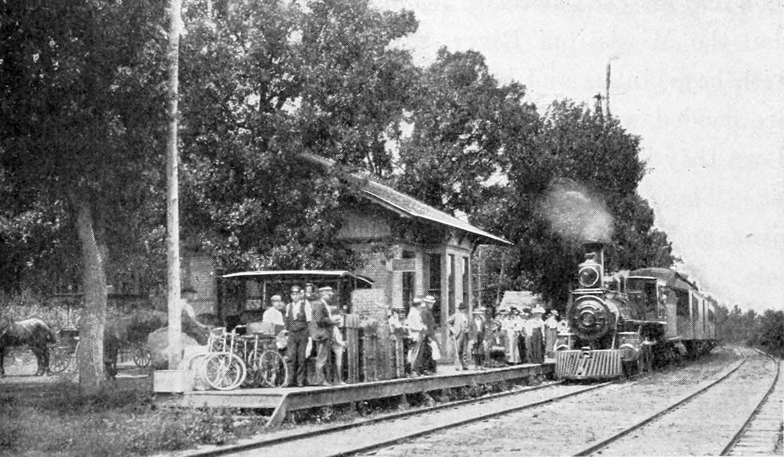 Depot at Okoboji, Iowa